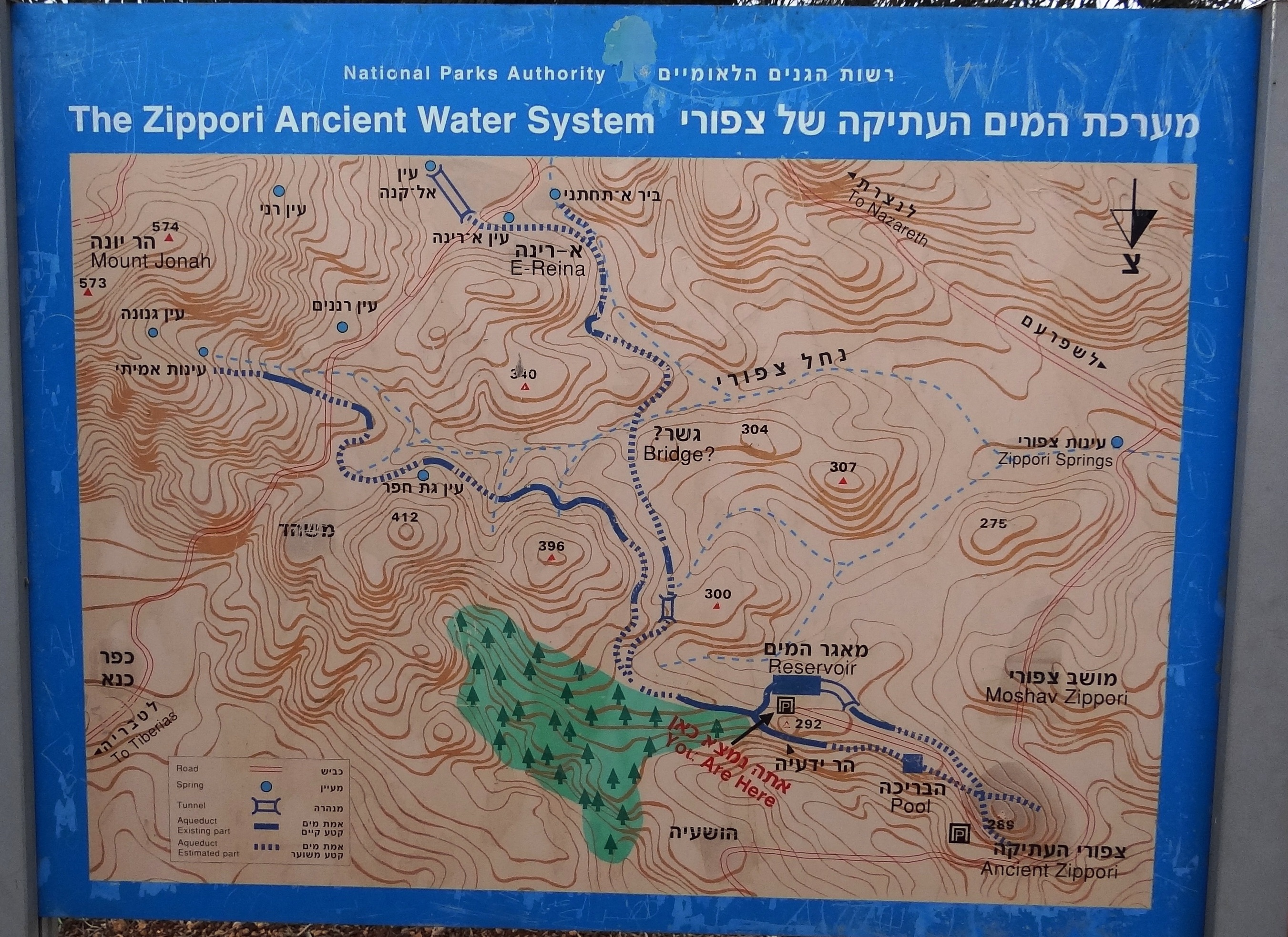 Zippori - The Ancient Water System במערכת המים העתיקה של ציפורי העיר העתיקה השוכנת בגליל